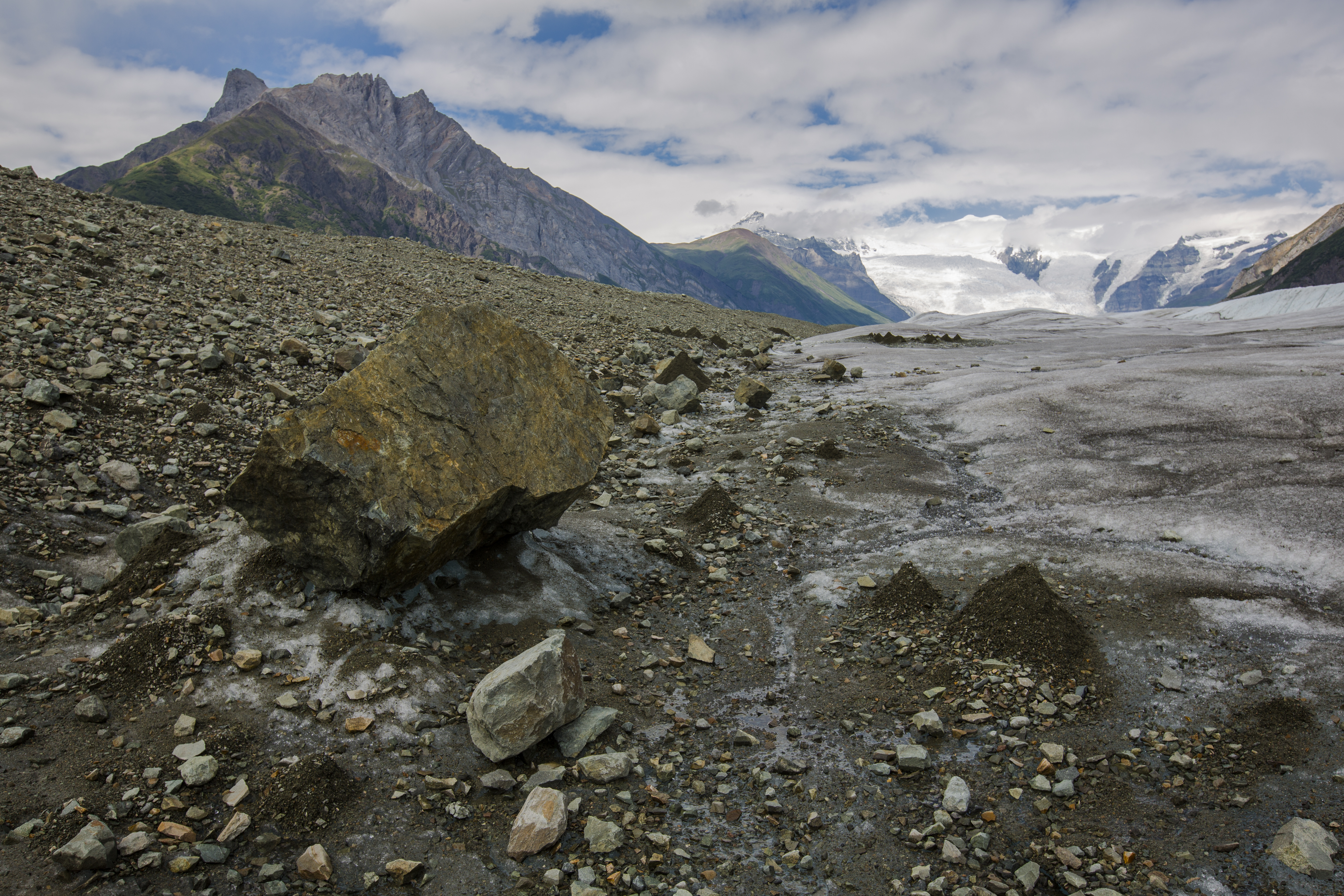 NPS / Jacob W. Frank